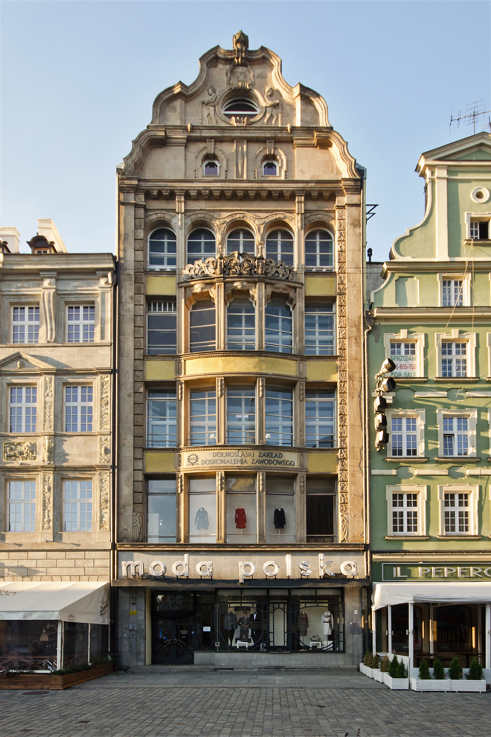 Wrocław Stare Miasto, Rynek 25 - dom handlowy „Moda Polska” (zabytek nr 171/487/Wm)